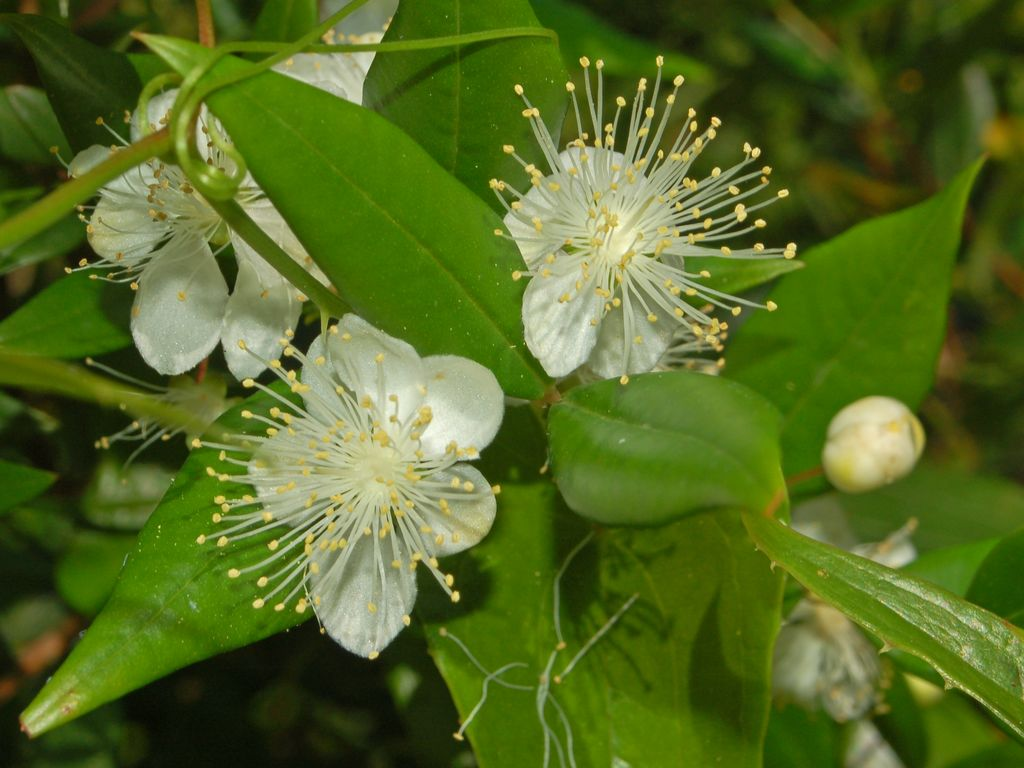 Myrtaceae - Myrtus communis